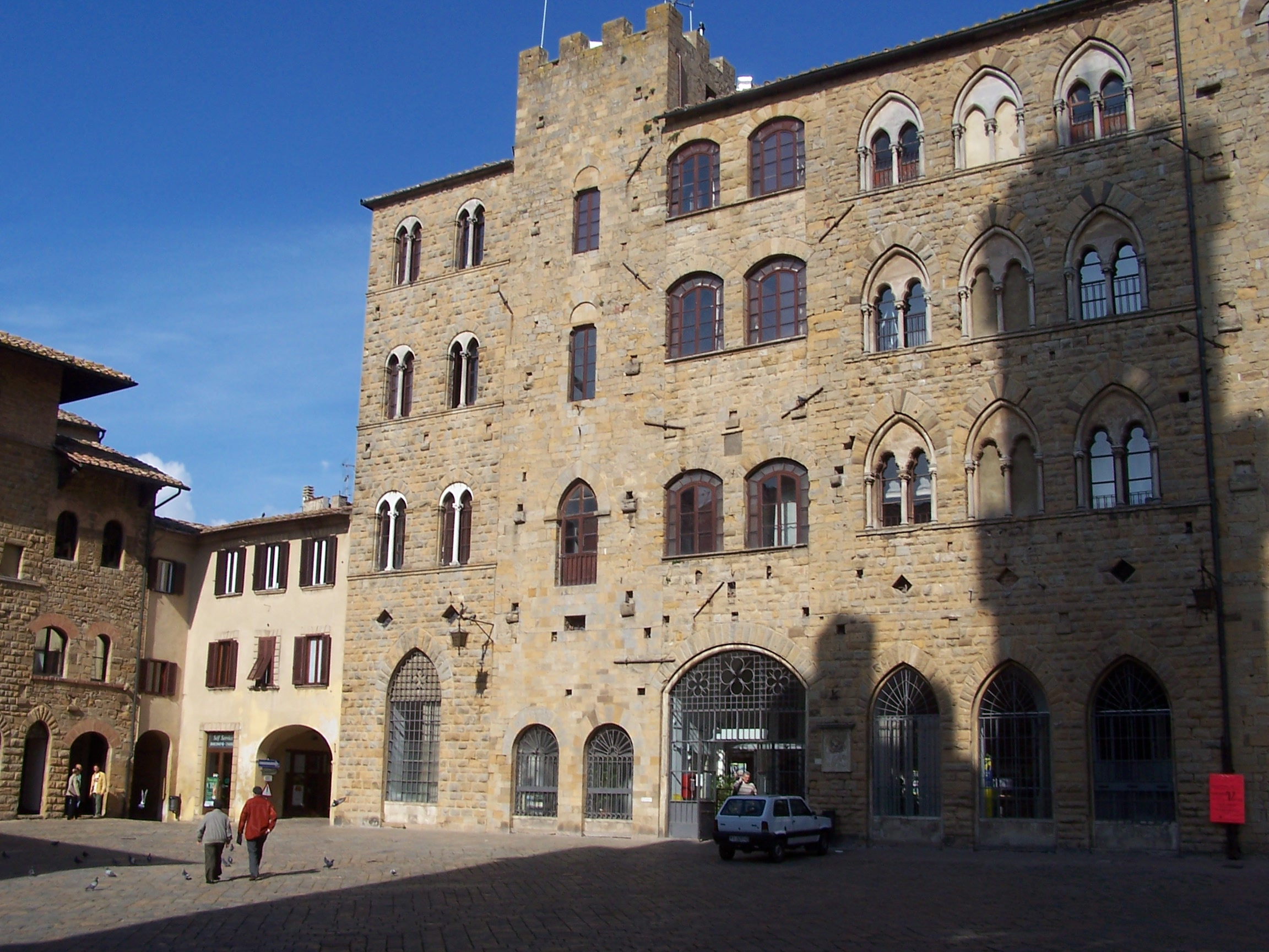 Volterra, Toscana, Italia